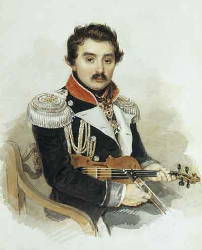 П.Ф.Соколов. Портрет А.Ф.Львова. 1836. Бумага, акварель, белила, лак. Государственный Литературный музей Алексей Федорович Львов (1798–1870)